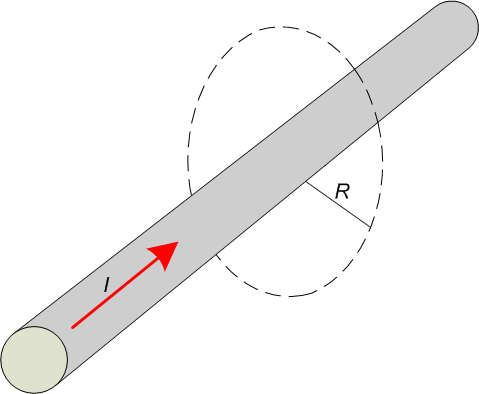 Tiesus ilgas plonas laidas, kuriuo teka stiprio I srovė.